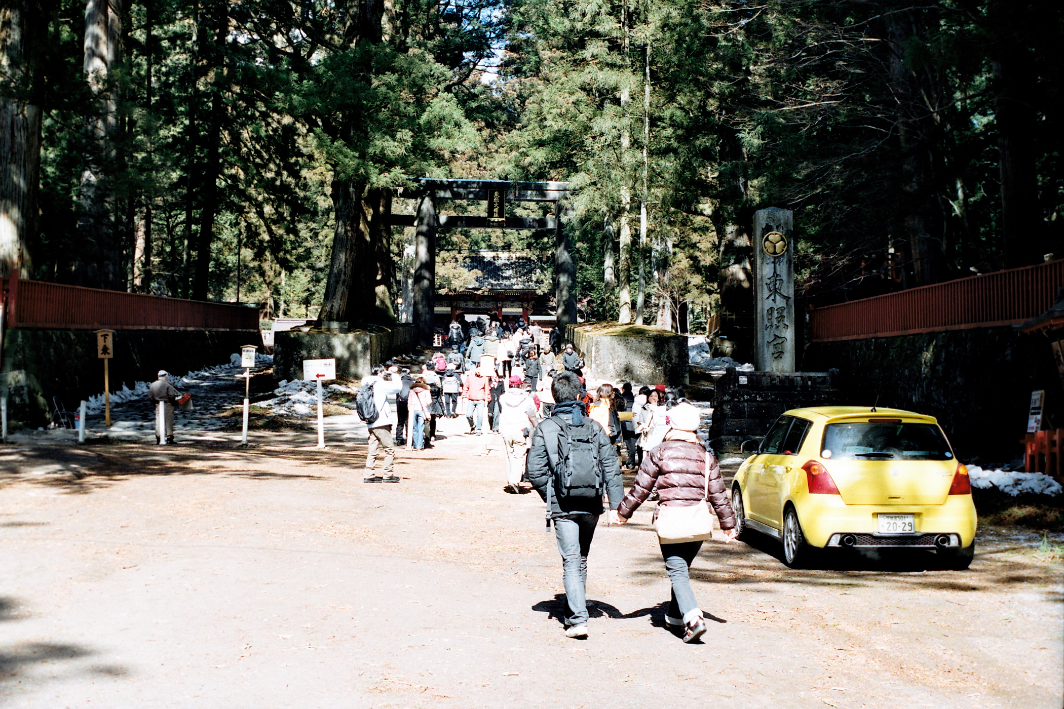 日光東照宮入口